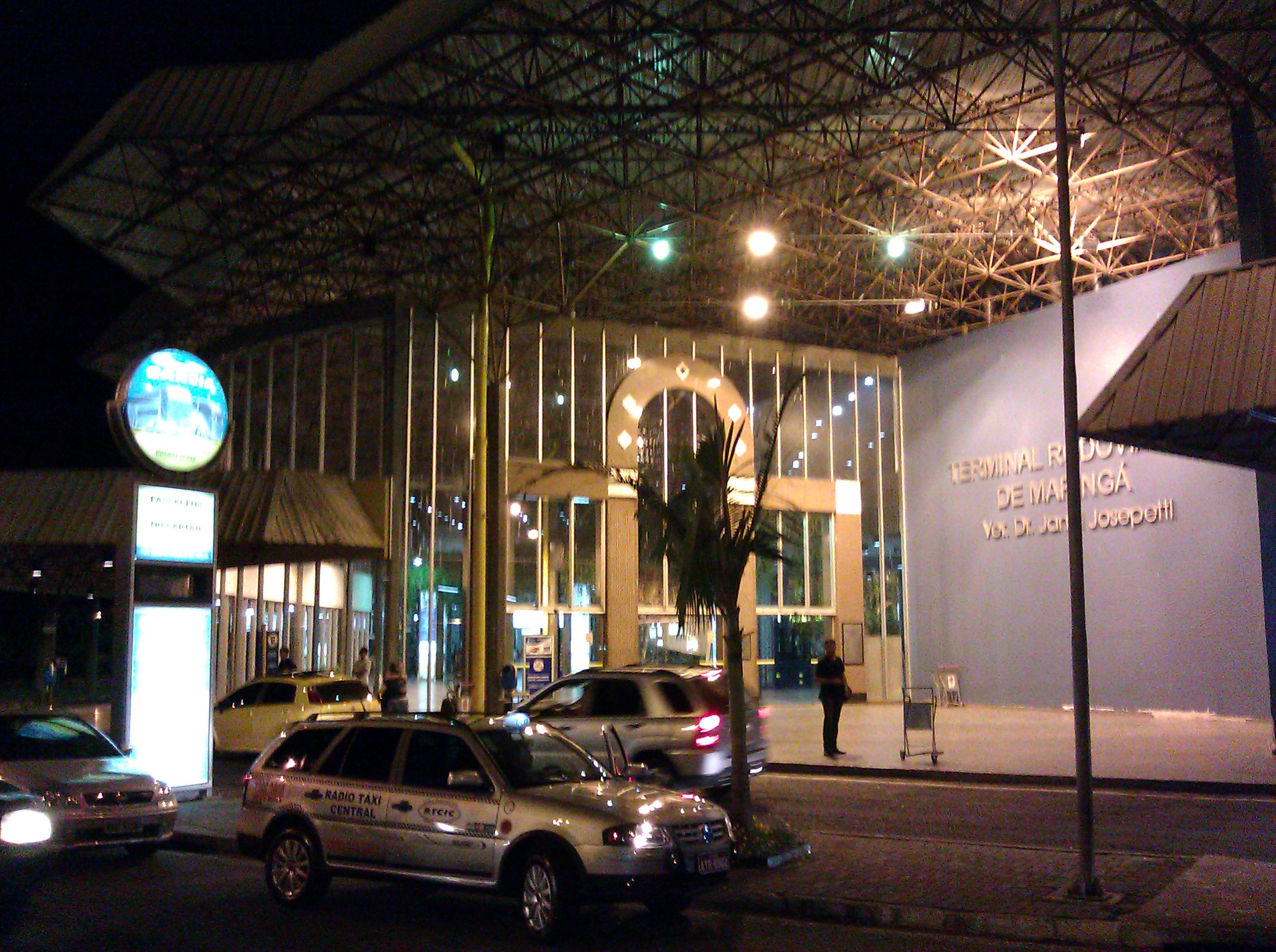 Rodoviaria Maringa - Pr - Parana - Brasil - Brazil